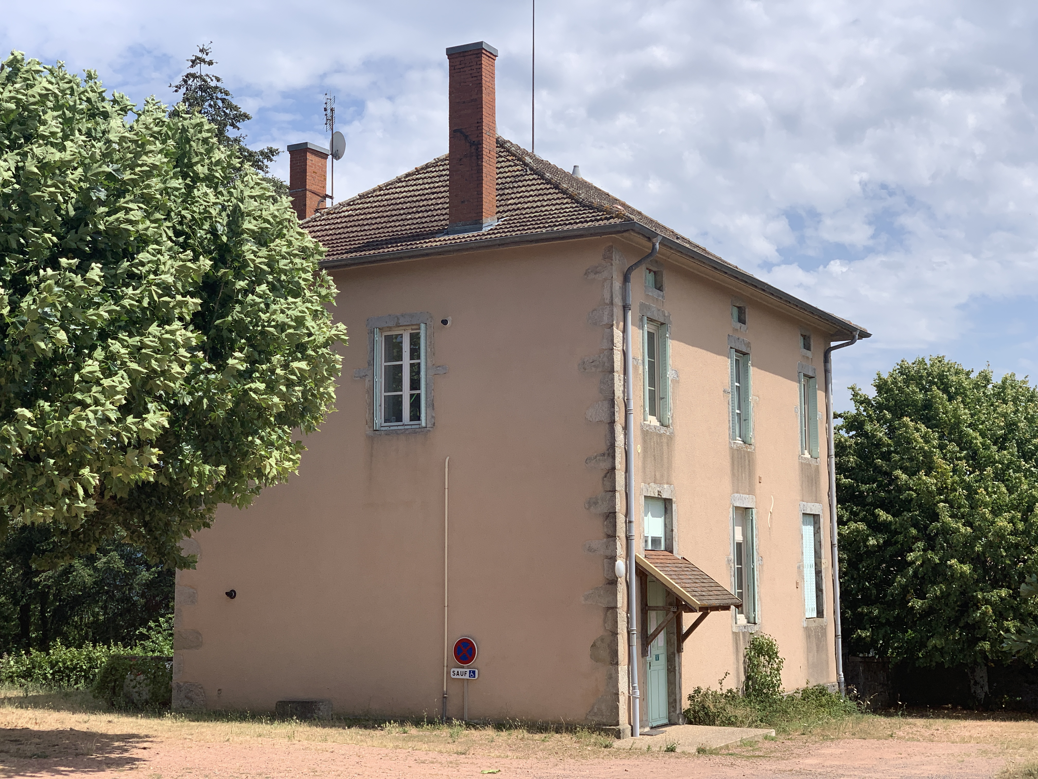 Mairie de Chiddes, Saône-et-Loire.